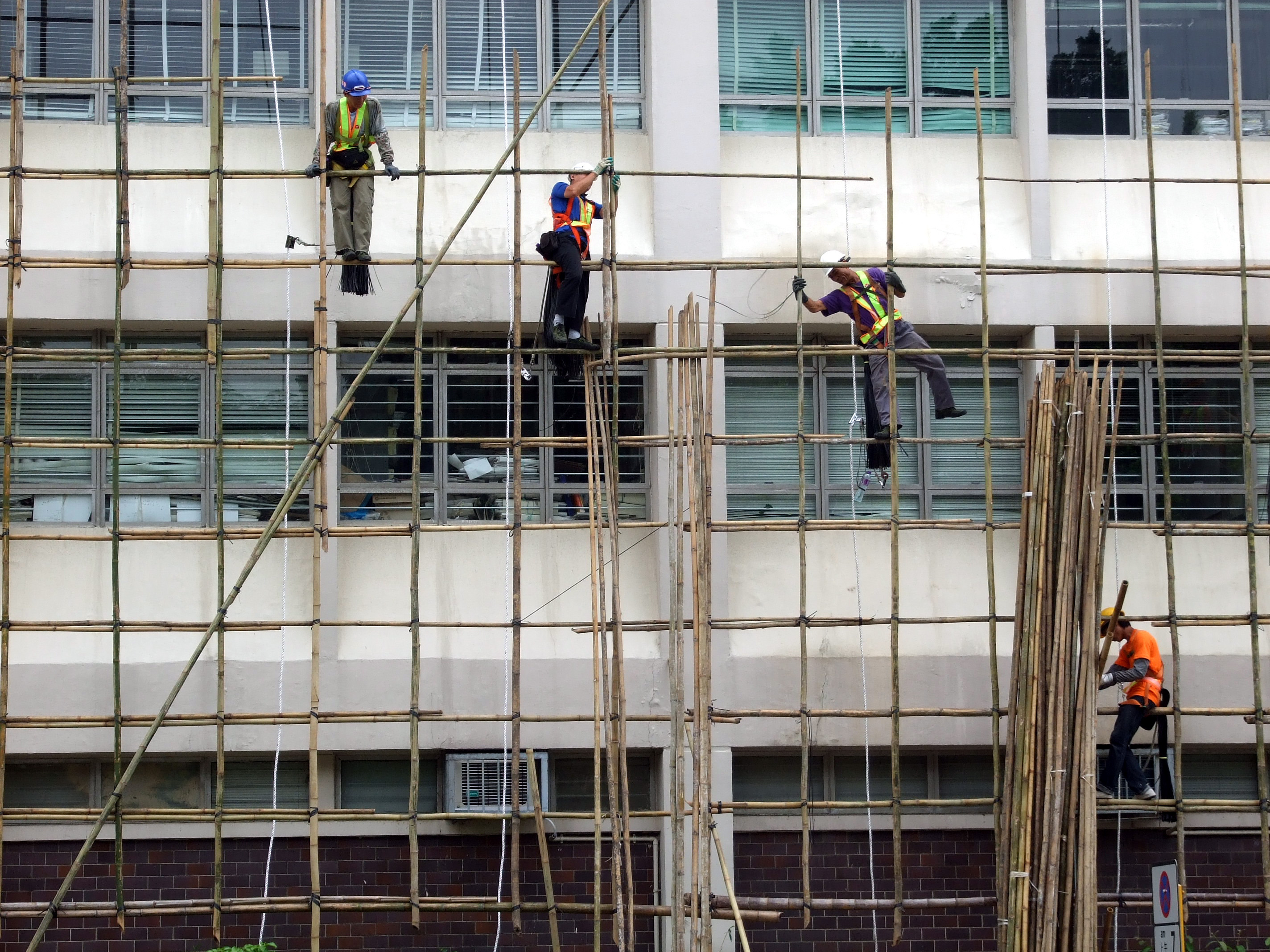 中文（香港）: 工人正在搭建棚架